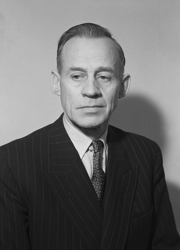 Trygve Nilsen (født 1893, død 1973) var en norsk politiker (Ap). Han var Oslos ordfører 1935–1936 og 1936–1940.